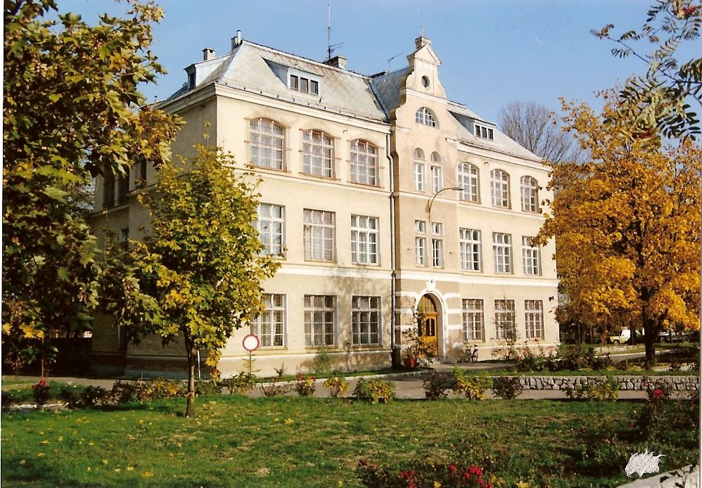 Budynek sztabu 36 pz potem 3 Bpanc i 36 BZ w Trzebiatowie